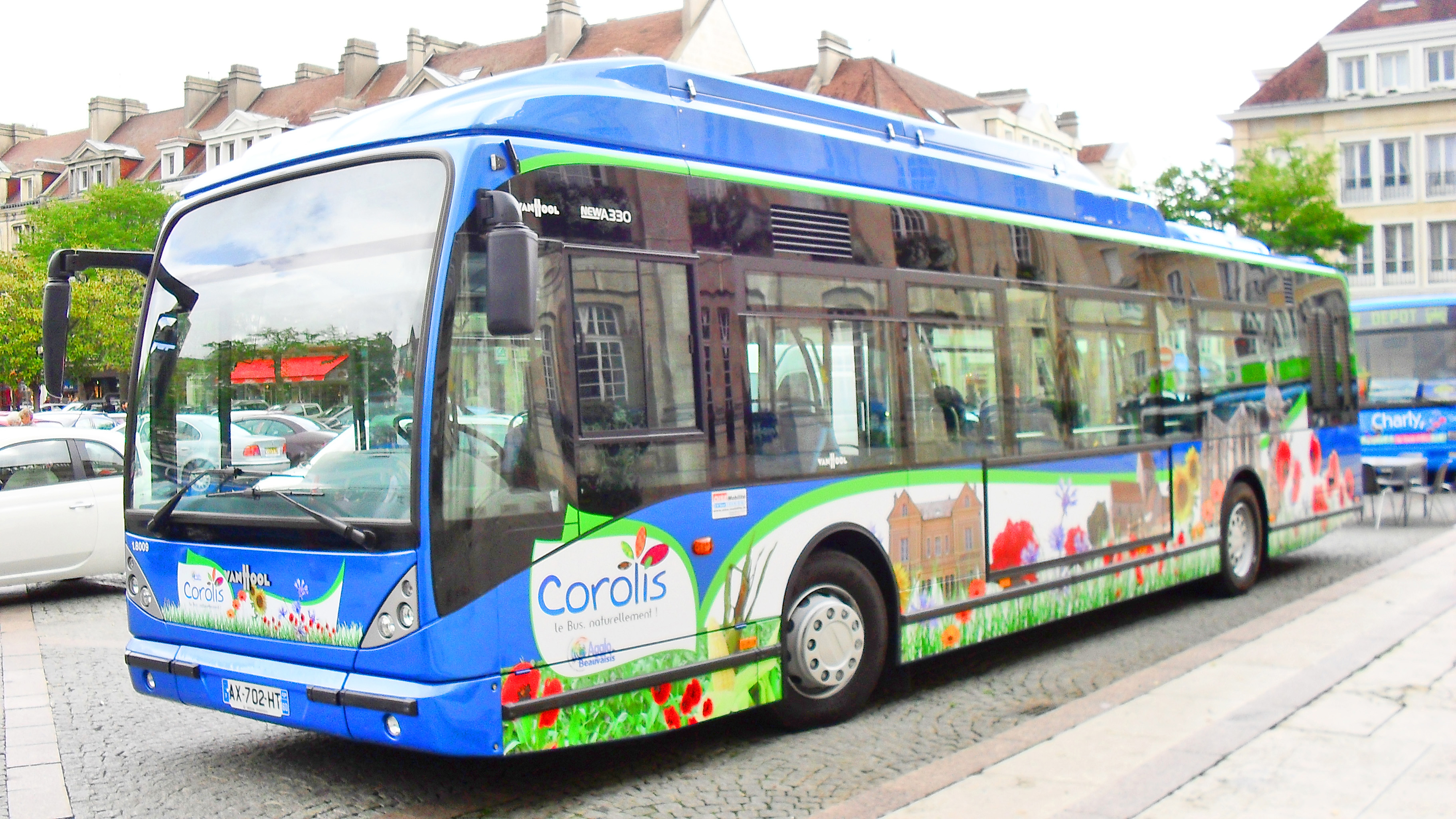 Un Van Hool A330 GNV sur le réseau Corolis de Beauvais